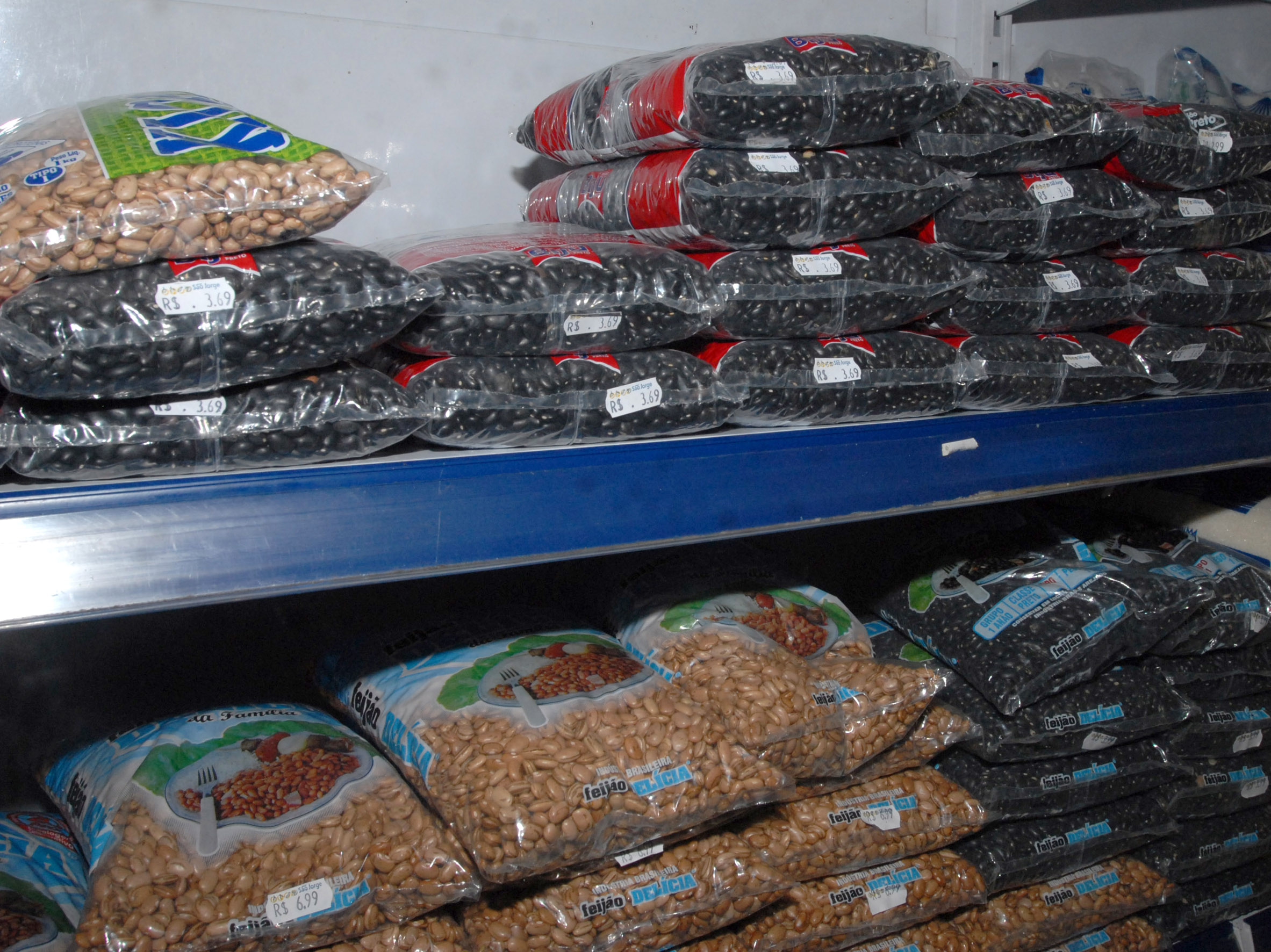 Feijão no mercado